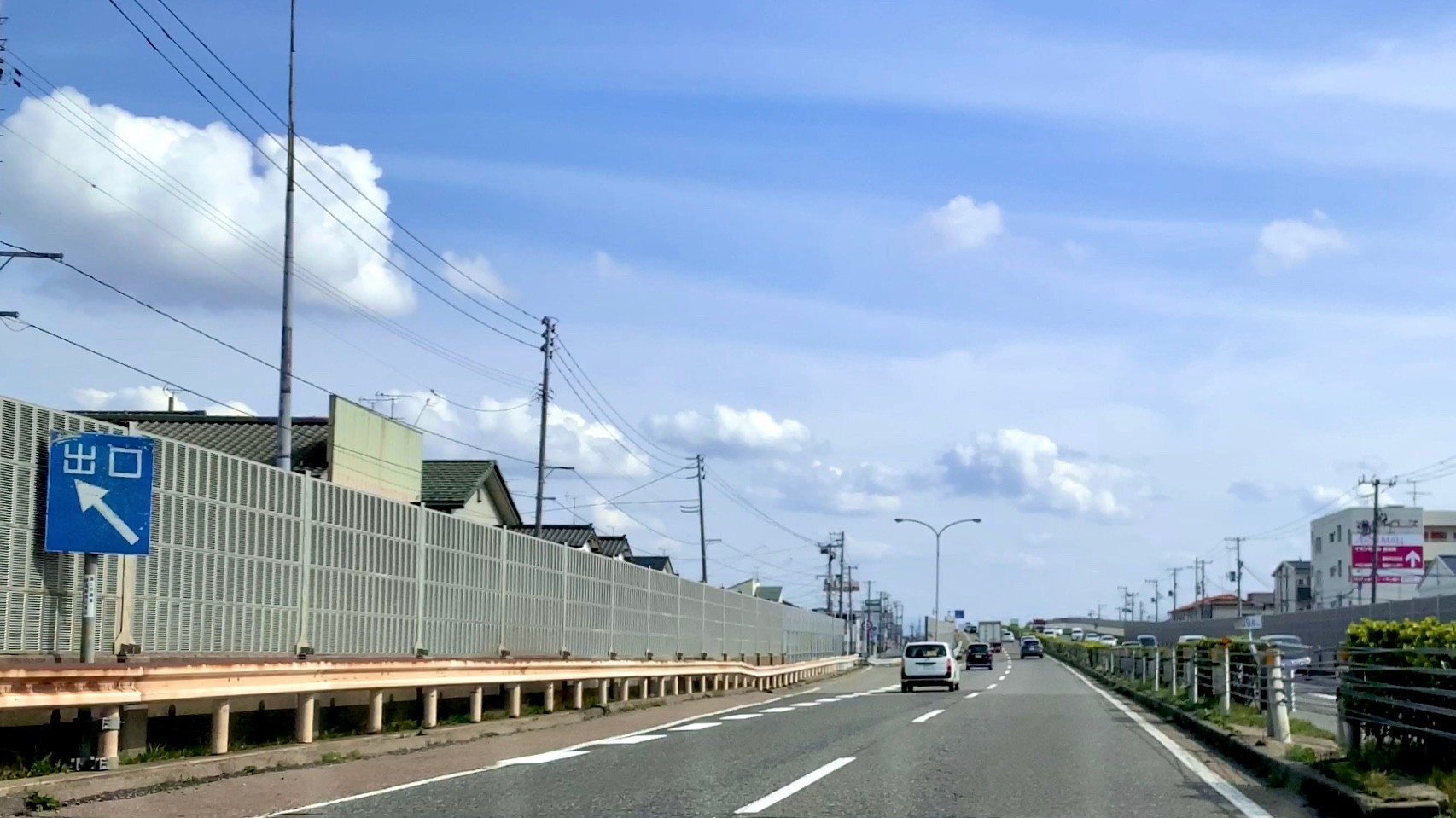 亀田バイパス・名前なし出口（2020年4月）